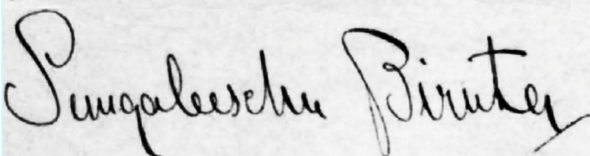 Zemgaliešu Birutas paraksts